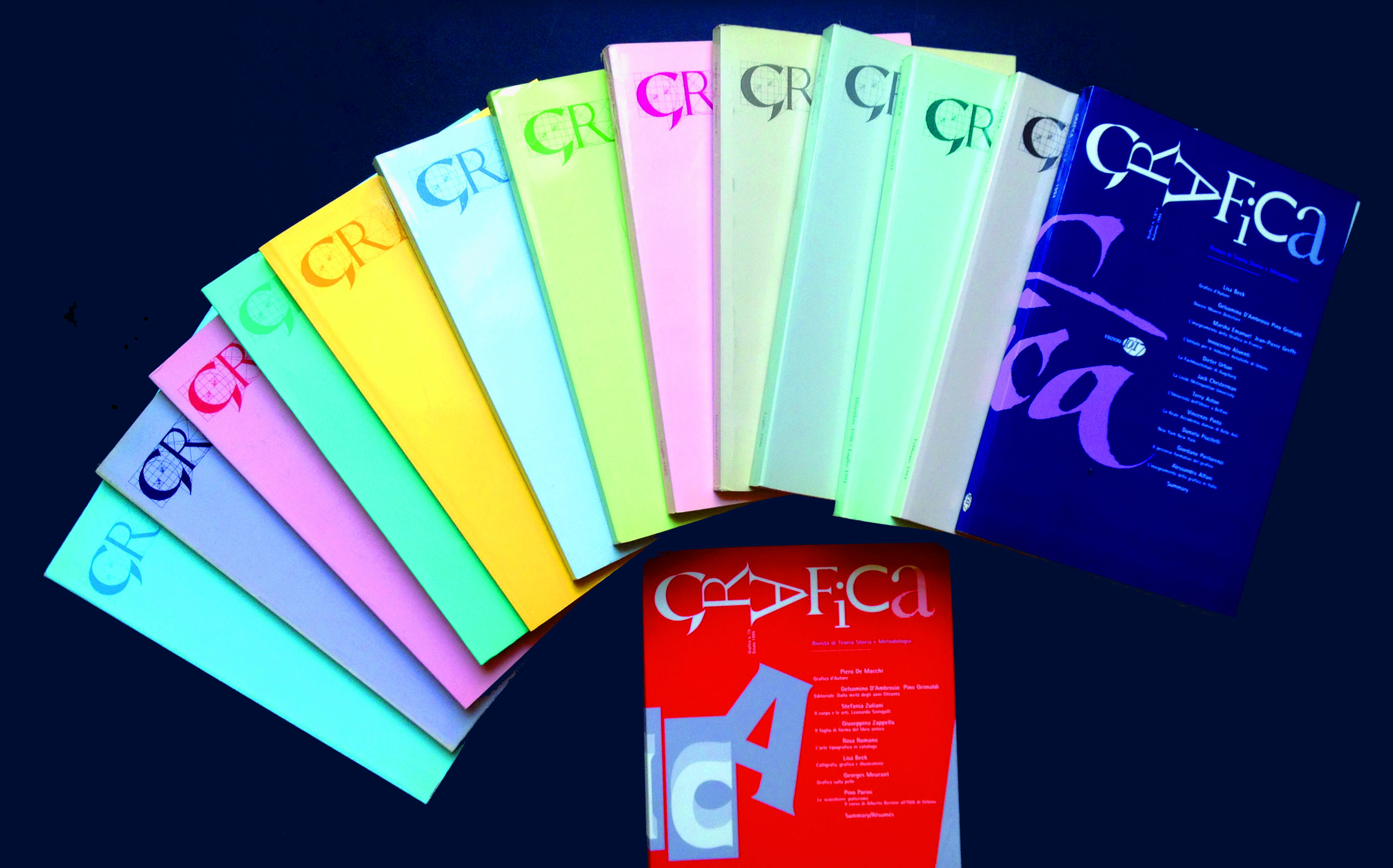 Panoramica con le uscite della rivista italiana "Grafica. Teoria Storia e metodologia", concepita e progettata da Gelsomino D'Ambrosio e Pino Grimaldi (1985-1995).